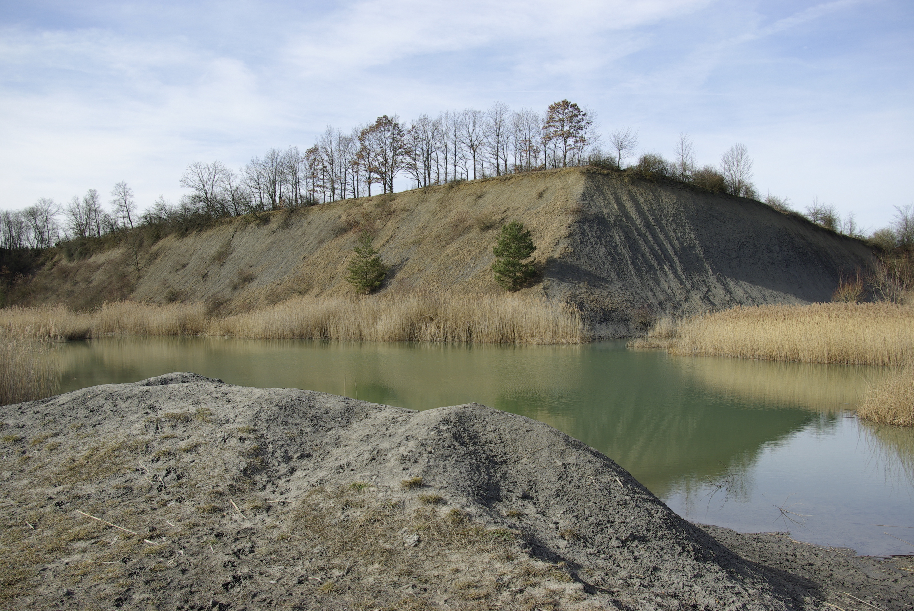 Die ehemalige Tongrube in Marloffstein im Landkreis Erlangen-Höchstadt.